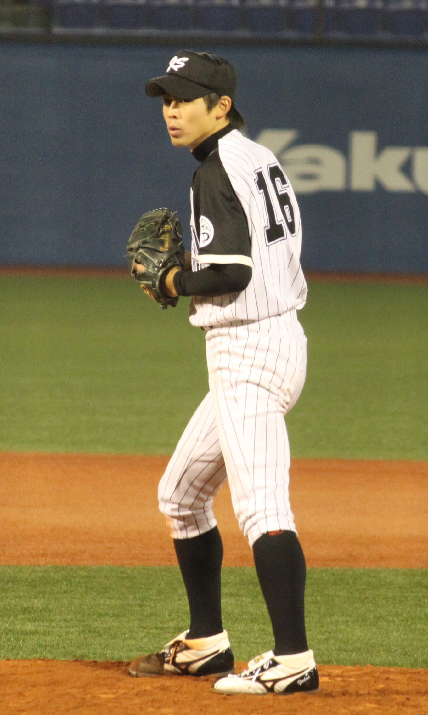 東都大学野球連盟：秋季リーグ戦優勝校の國學院大学打線を相手に力投する九州産業大学の榎下陽大投手